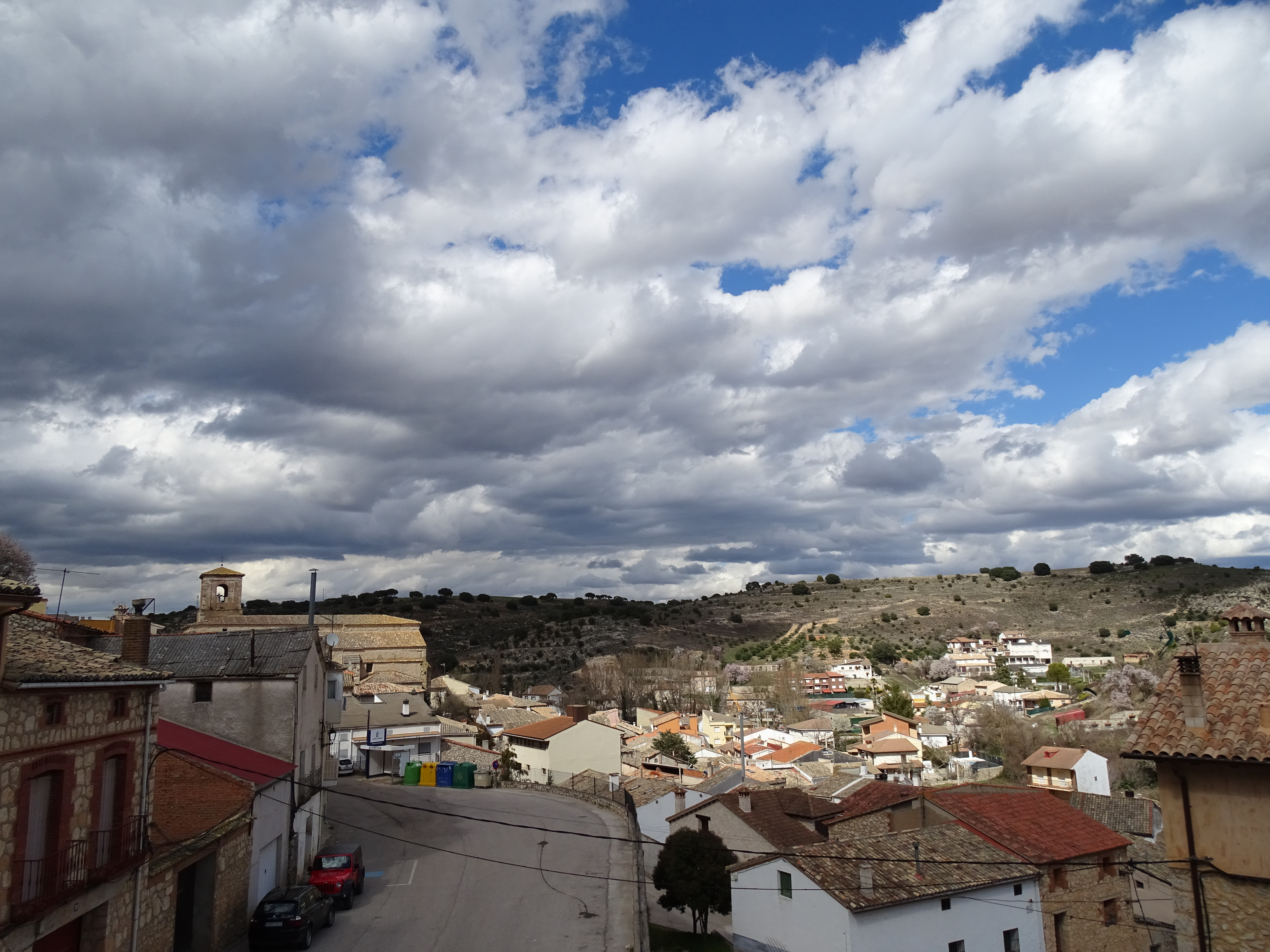 Se puede ver la Iglesia y los alrededores.